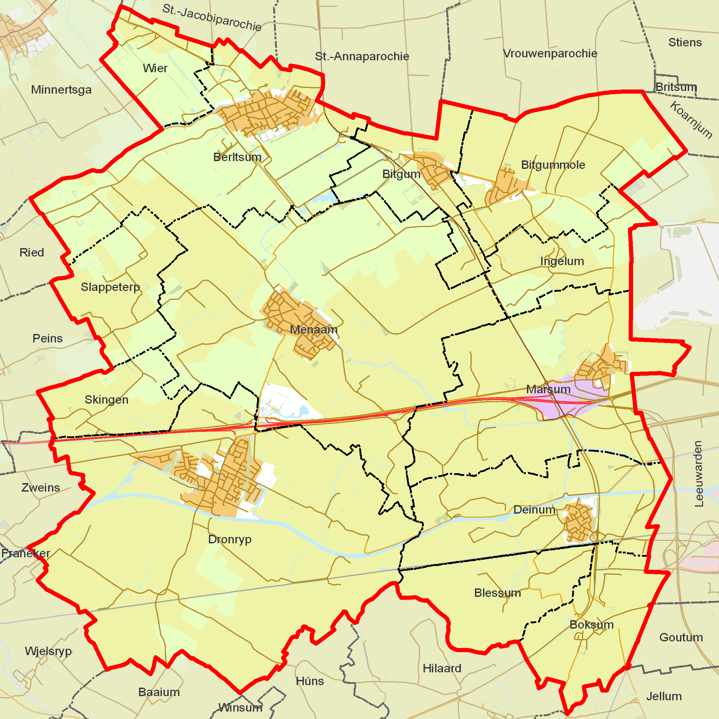 BAG woonplaatsen - Gemeente Menameradiel.png